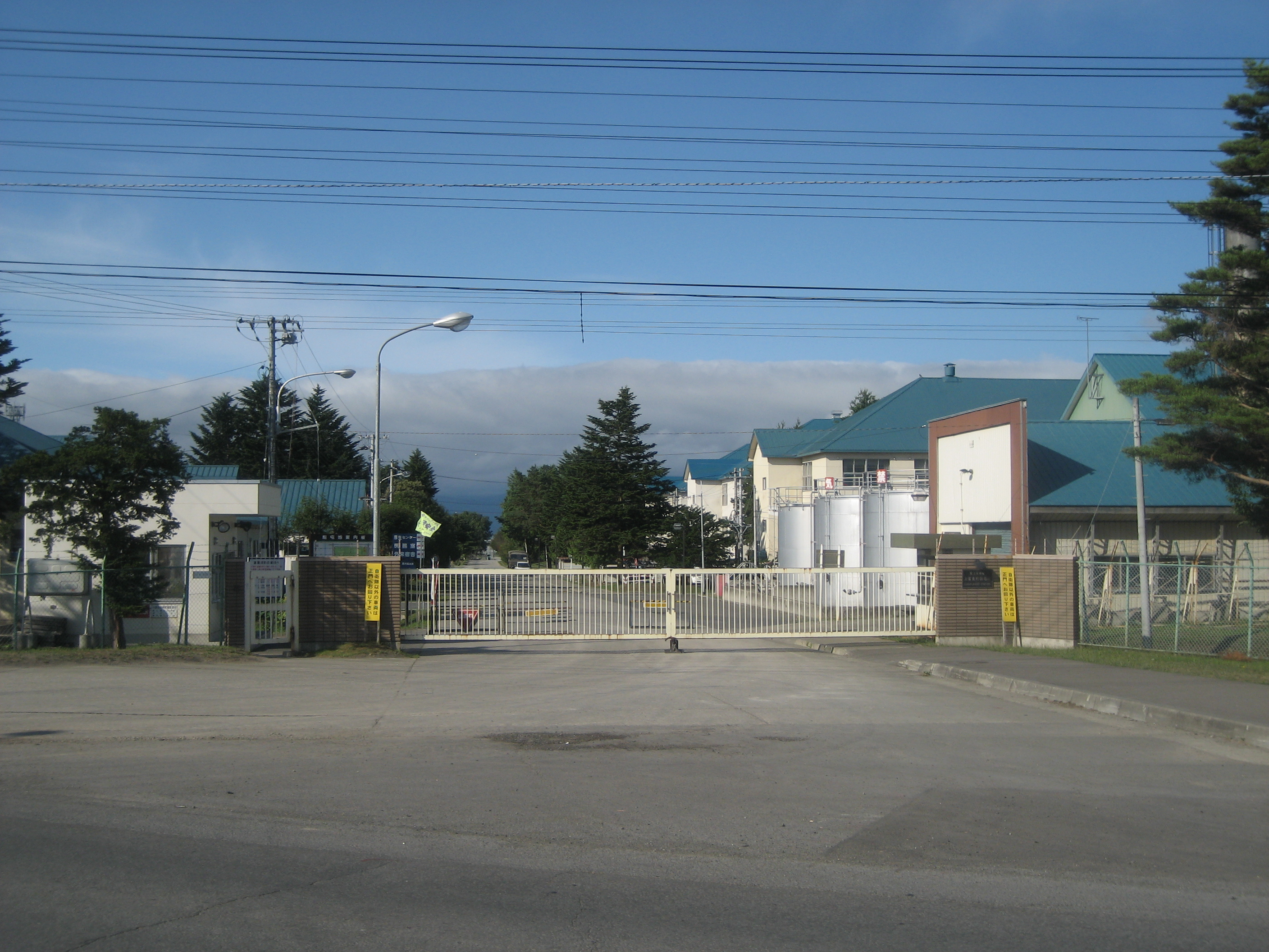 陸上自衛隊上富良野駐屯地（道道298号線側門付近を撮影）